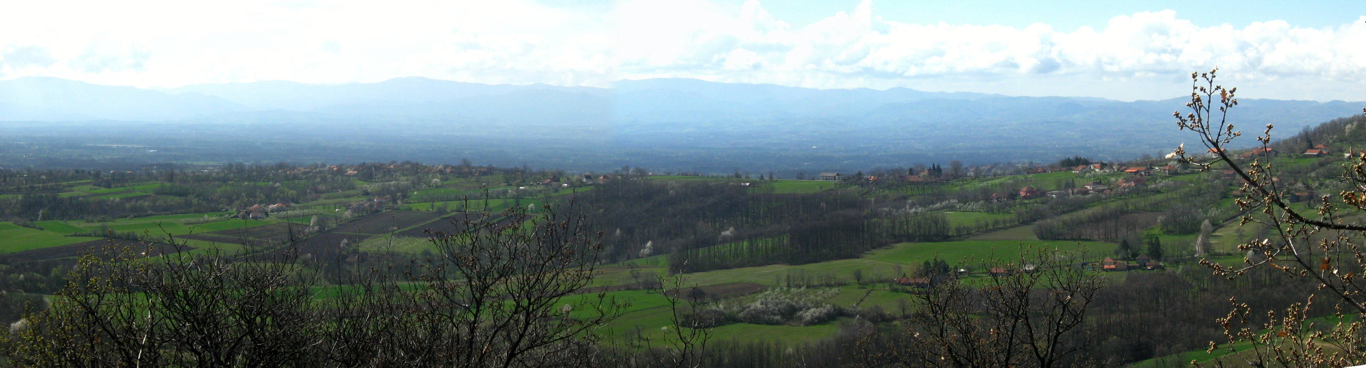 Pogled na Bečanj